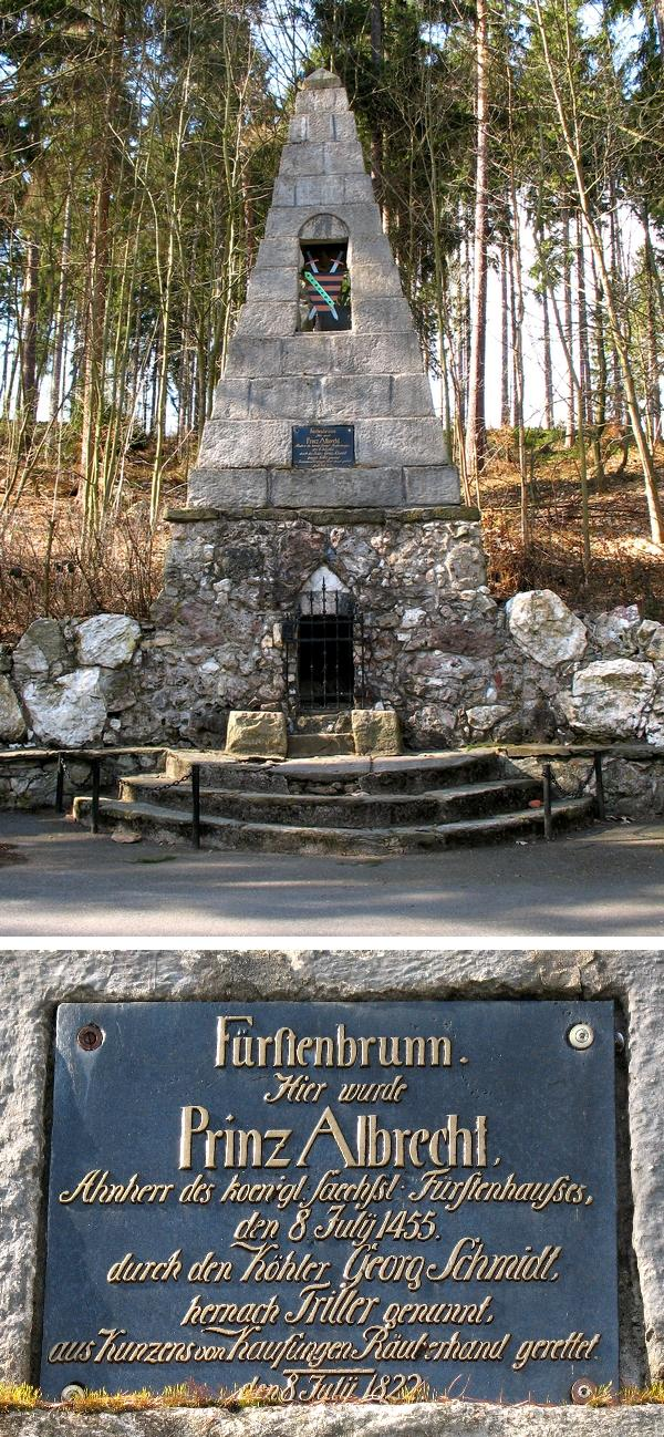 Obelisk at Fürstenbrunn, Detail.